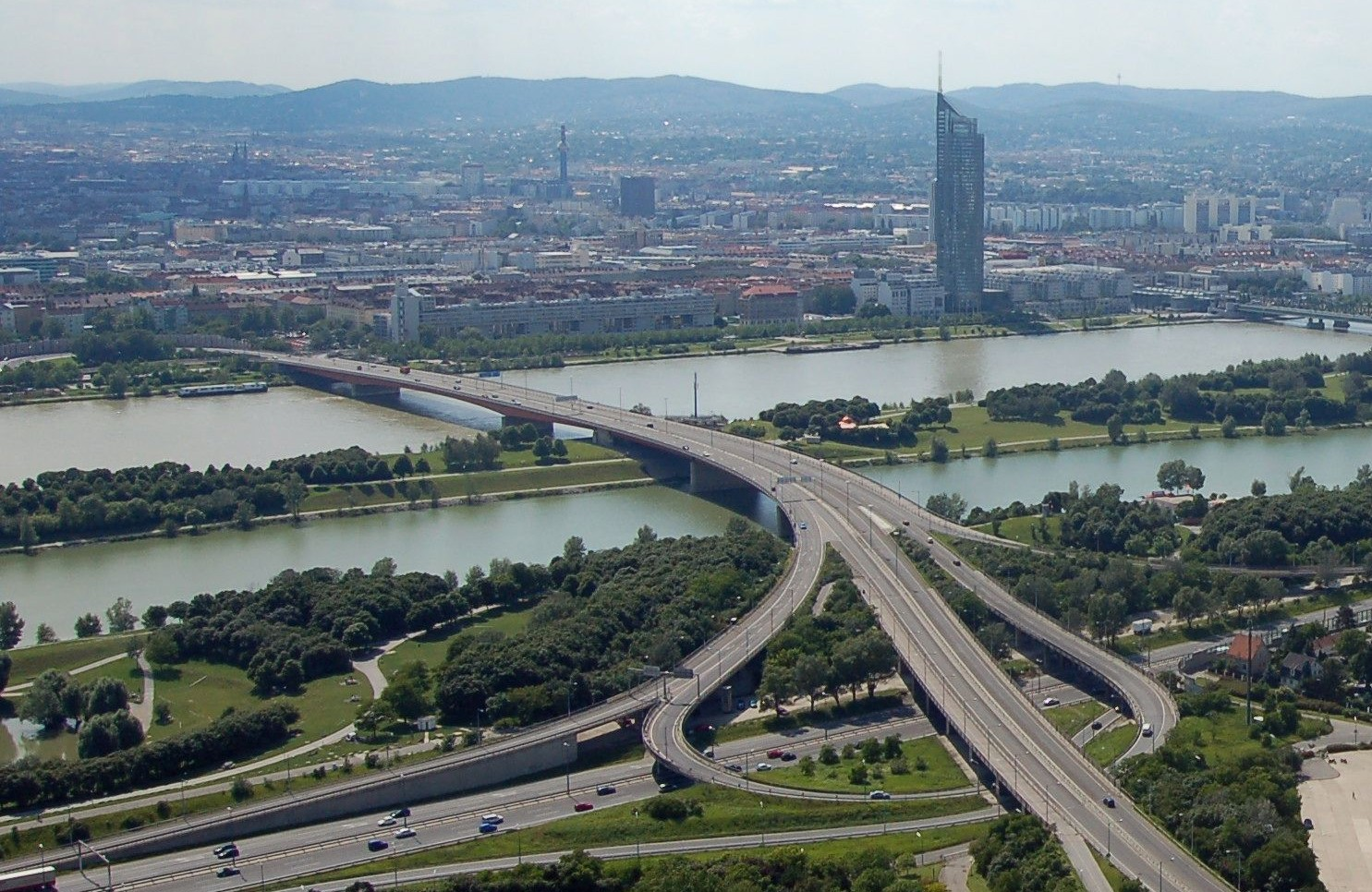 Brigittenauer Brücke in Wien vom Donauturm aus gesehen, rechts im Hintergrund der Millennium Tower Wien